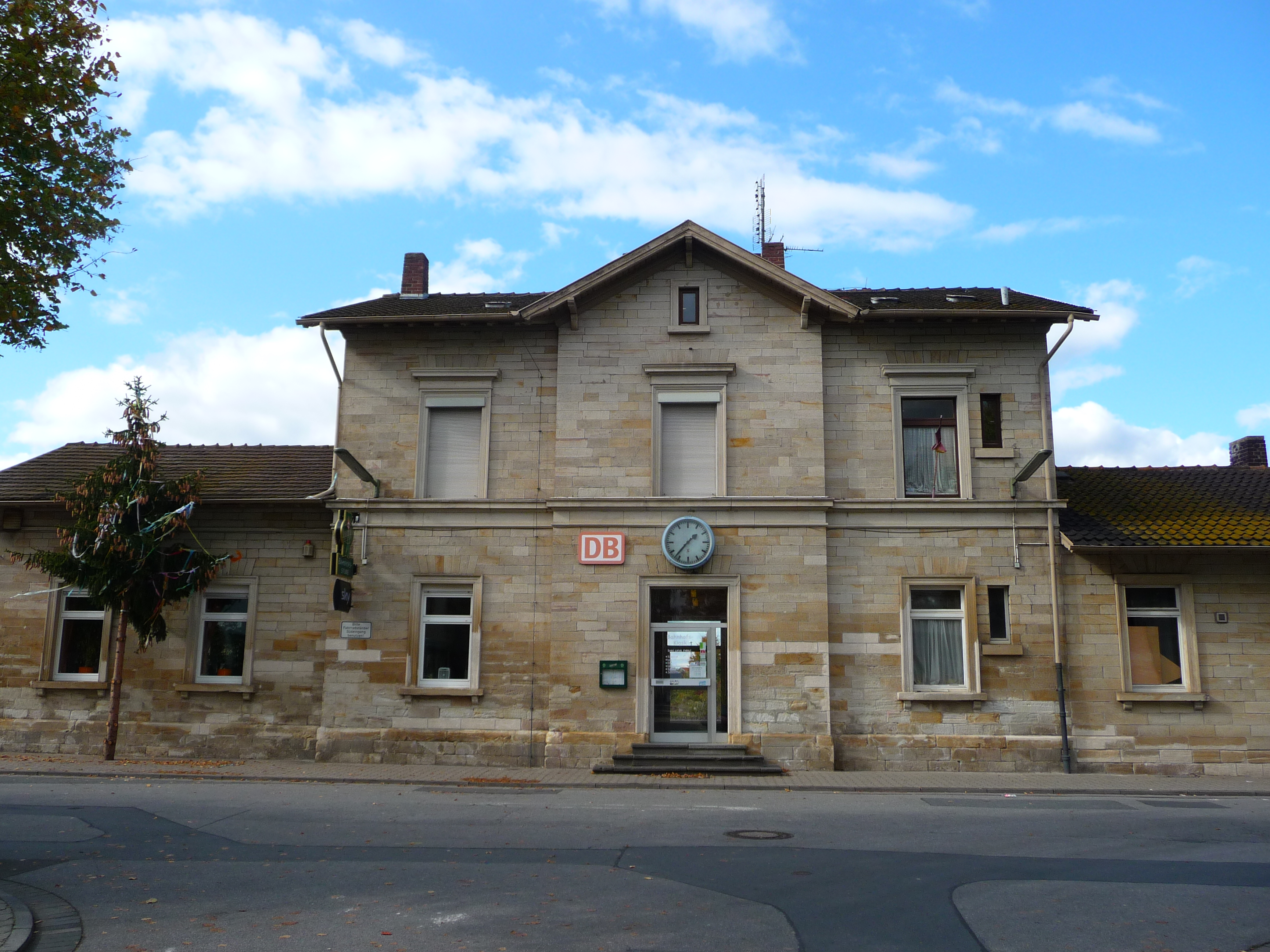 Bahnhofsgebäude in Goddelau, einem Stadtteil von Riedstadt (Hessen, Deutschland)